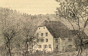 L'Institut de Glay (Doubs), fréquenté par le missionnaire français François Coillard. Extrait de : Édouard Favre, François Coillard, Enfance et jeunesse, Société des Missions Évangéliques, Paris 1910